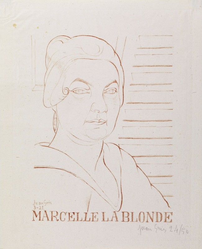 Marcelle la Blonde, litografía de Juan Gris (1921).